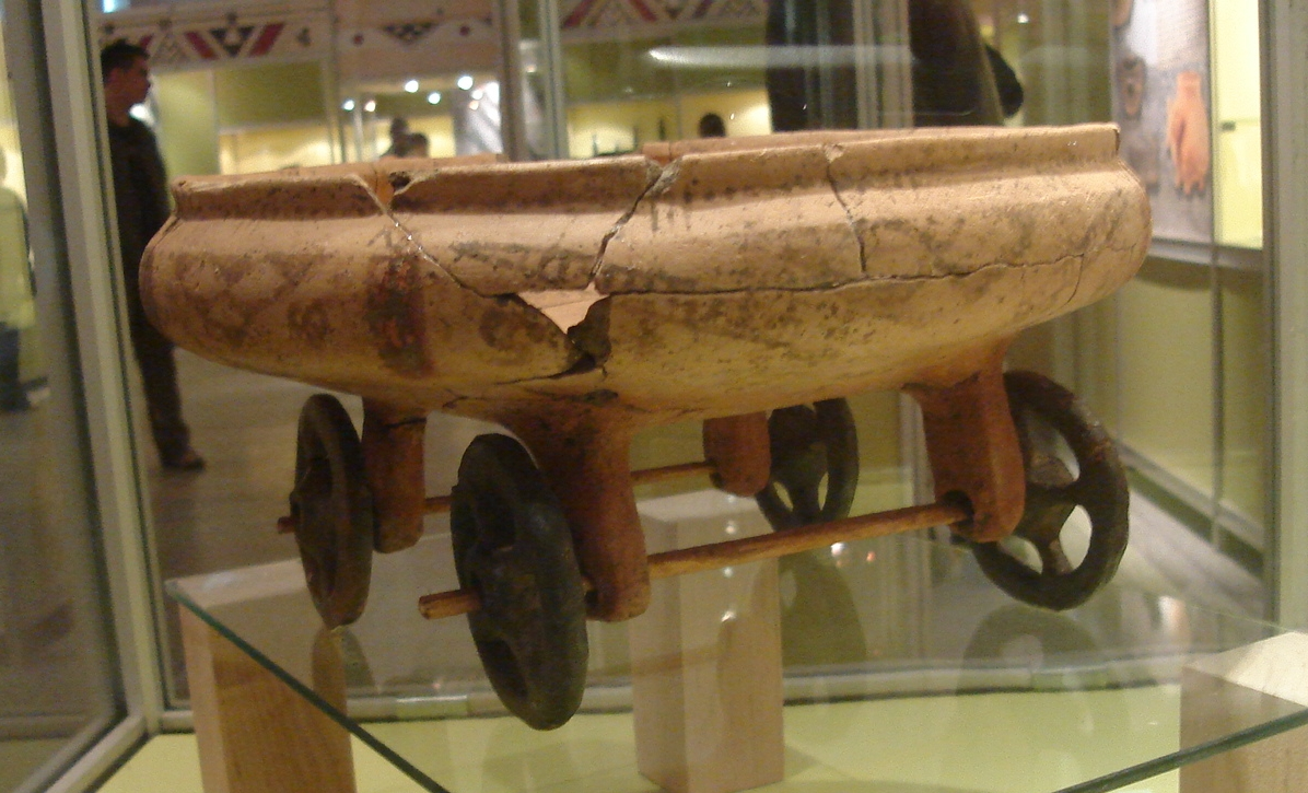 Wózek kultowy z Domasławia z kultury łużyckiej, pochodzący z okresu halsztackiego.